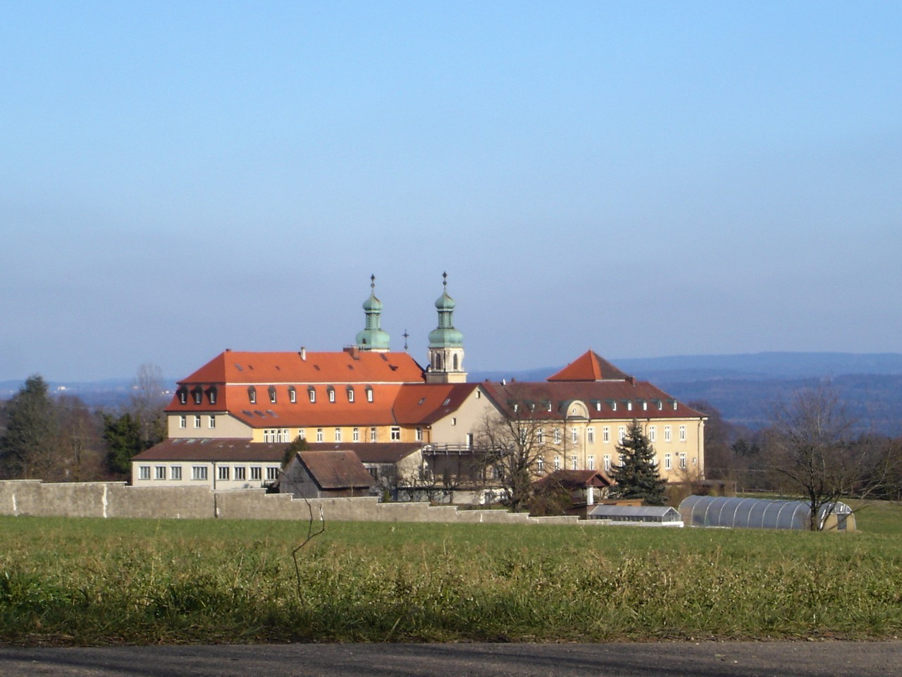 Abteikirche St. Erentraud, Kloster Kellenried, 88276 Berg